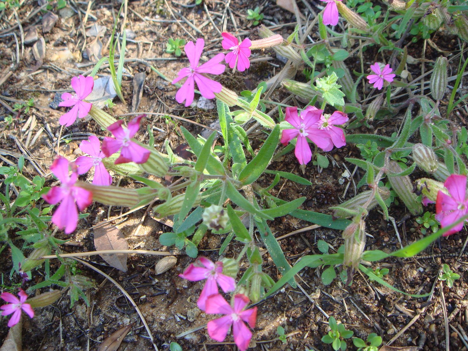 Silene stockenii A.O. Chater. Endemismo gaditano. Jardín Botánico de San Fernando (Cádiz), España